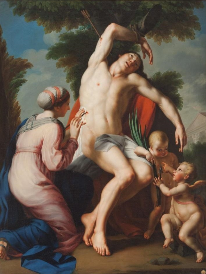 La obra representa al mártir San Sebastián siendo atendido y curado por Santa Irene.